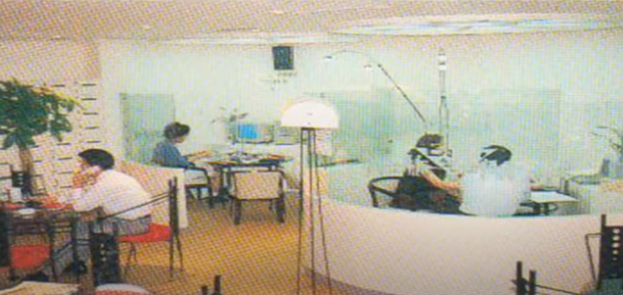 '93년 3월 한국 서울 서초동 법원 정문 앞에 문을 연 BNC(bit network cafe)